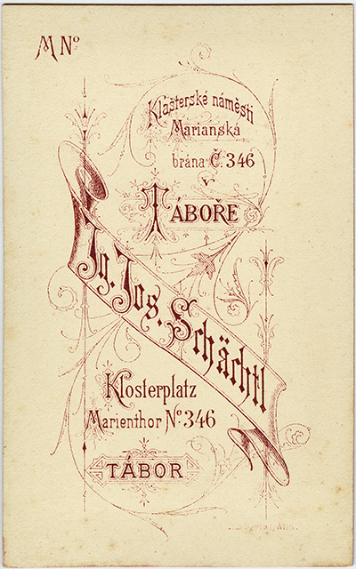 Zadní strana fotografie z roku 1877